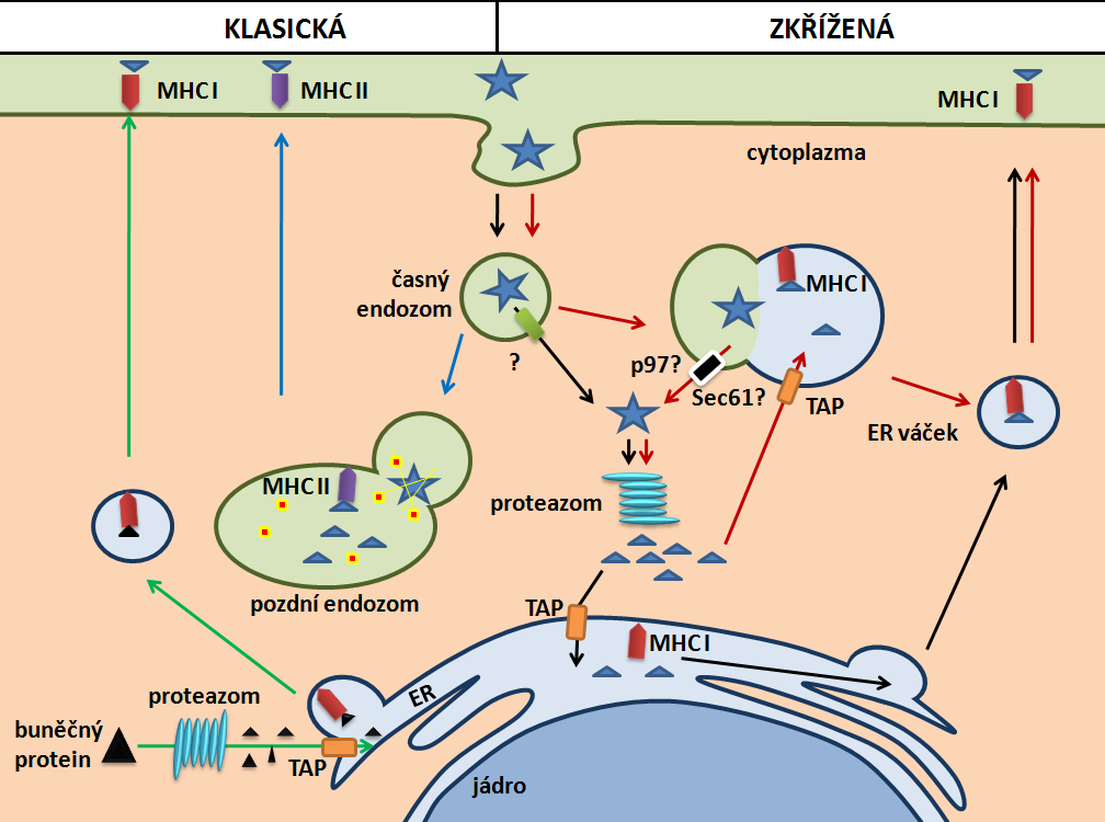 Rozdíl mezi klasickou a zkříženou prezentací